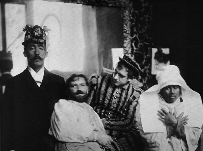 Paul Gauguin, Alfons Mucha, Ludek Marold, Annah la Javanaise